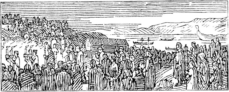 Gerhard Munthe: Illustration for Magnussønnens saga. Snorre 1899-edition. nn: «Likferda til kong Øystein.» nb: «Kong Øysteins likferd»